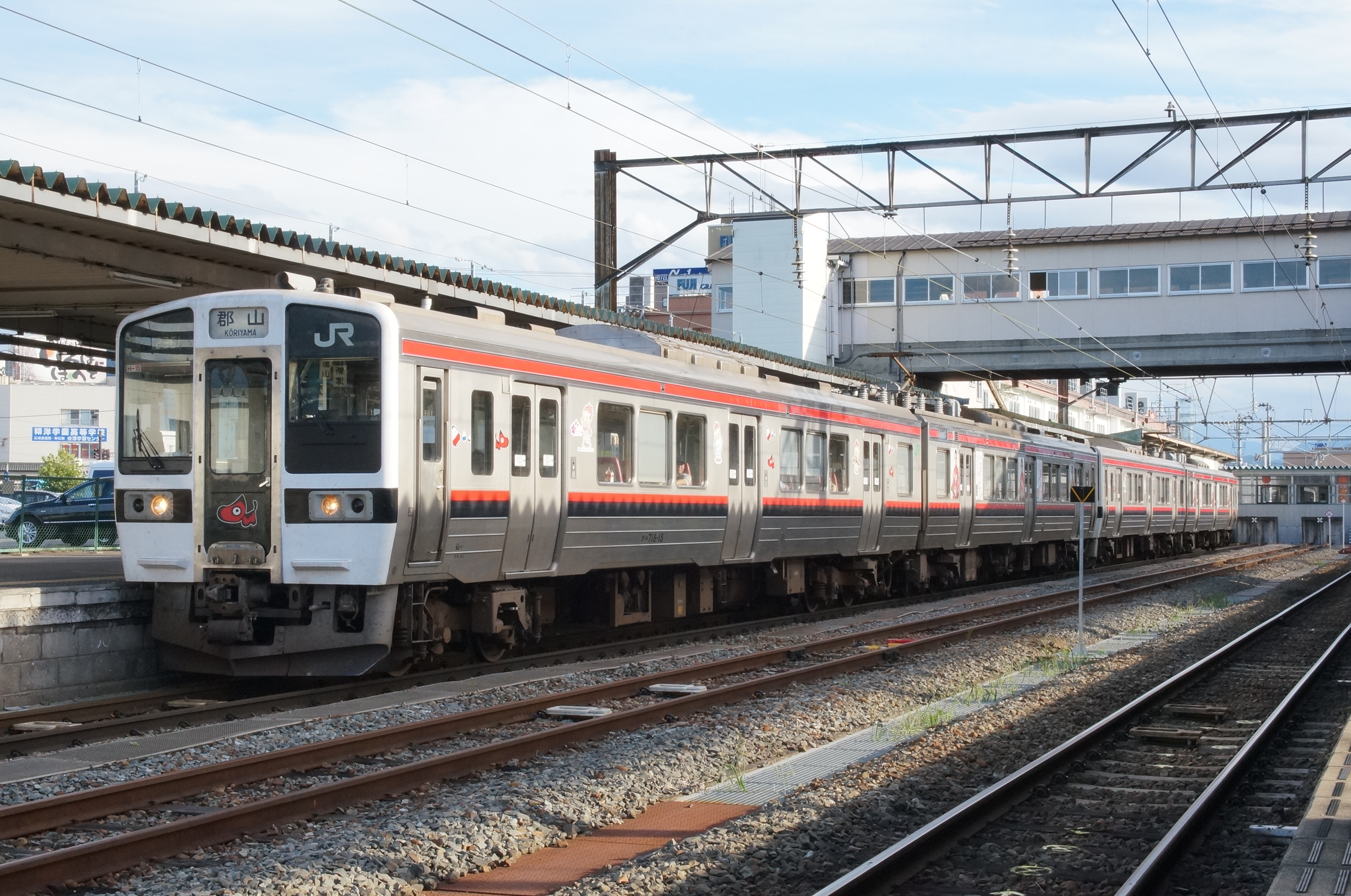 会津若松駅停車中の磐越西線用719系